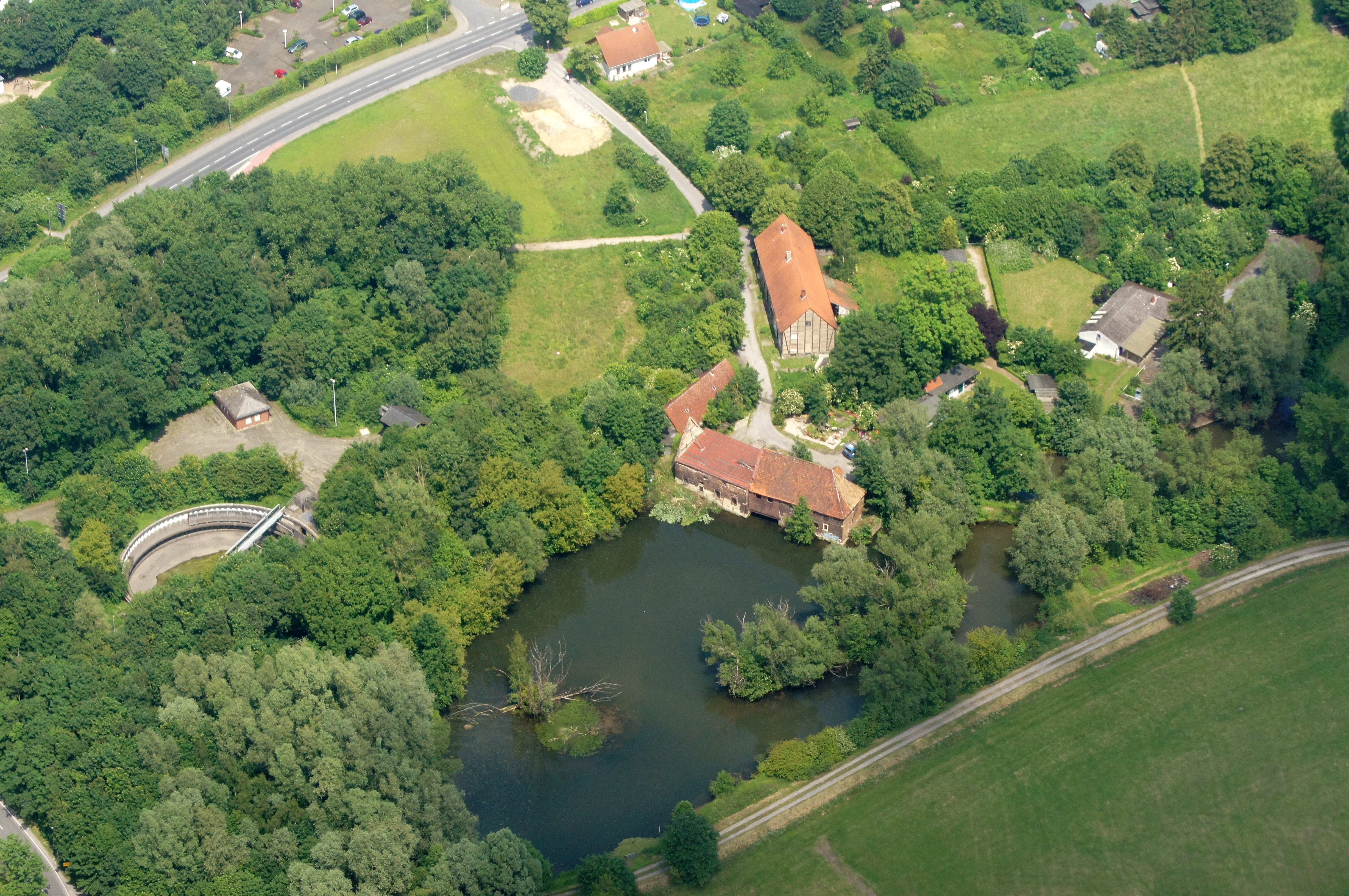 Schlossmühle Heessen in den Lippeauen bei Heessen, Hamm, Nordrhein-Westfalen, Deutschland. Das Bild entstand während des Münsterland-Fotoflugs am 1. Juni 2014. Hinweis: Die Aufnahme wurde aus dem Flugzeug durch eine Glasscheibe hindurch fotografiert.